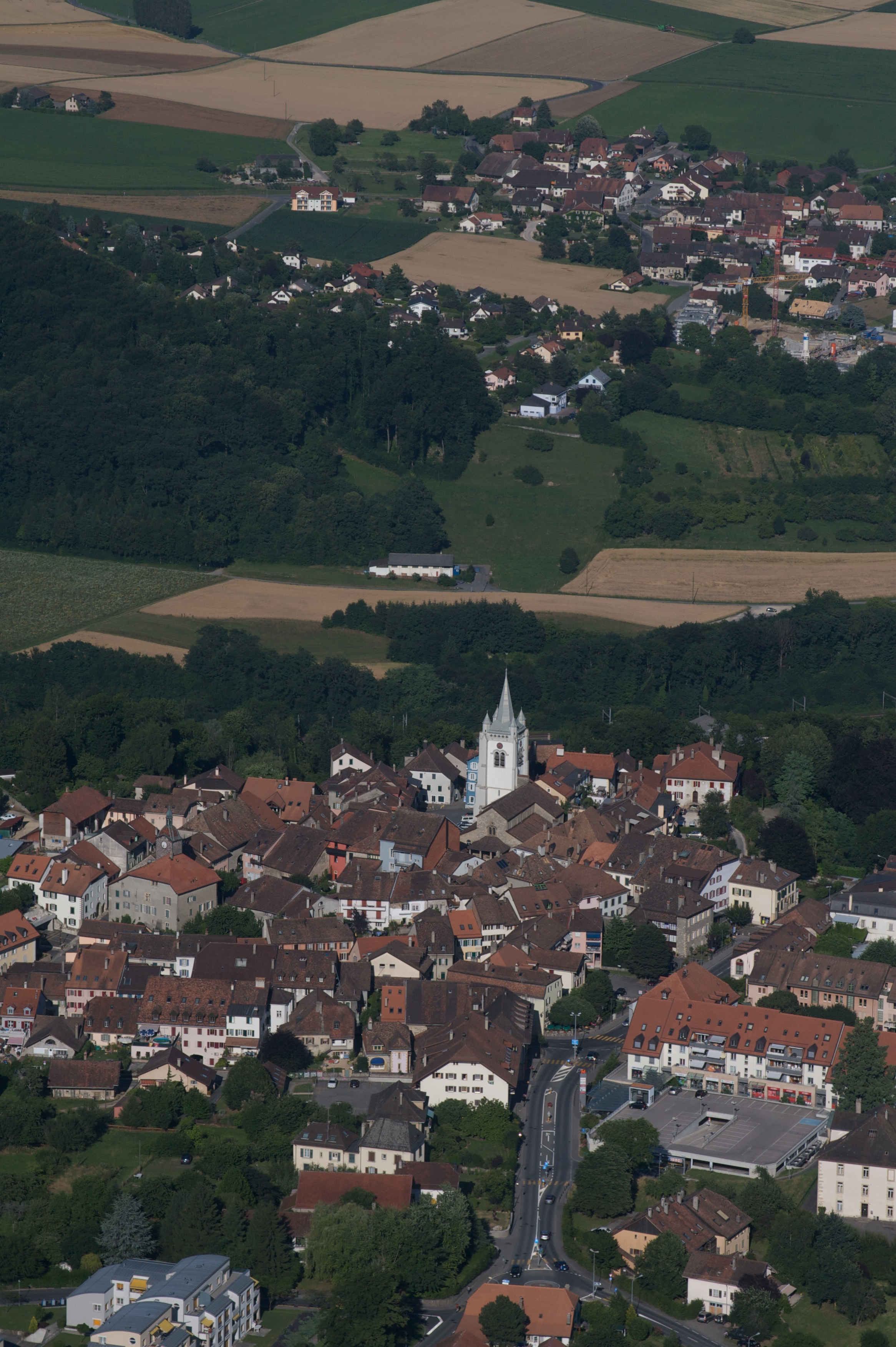 And, behind, Penthalaz.